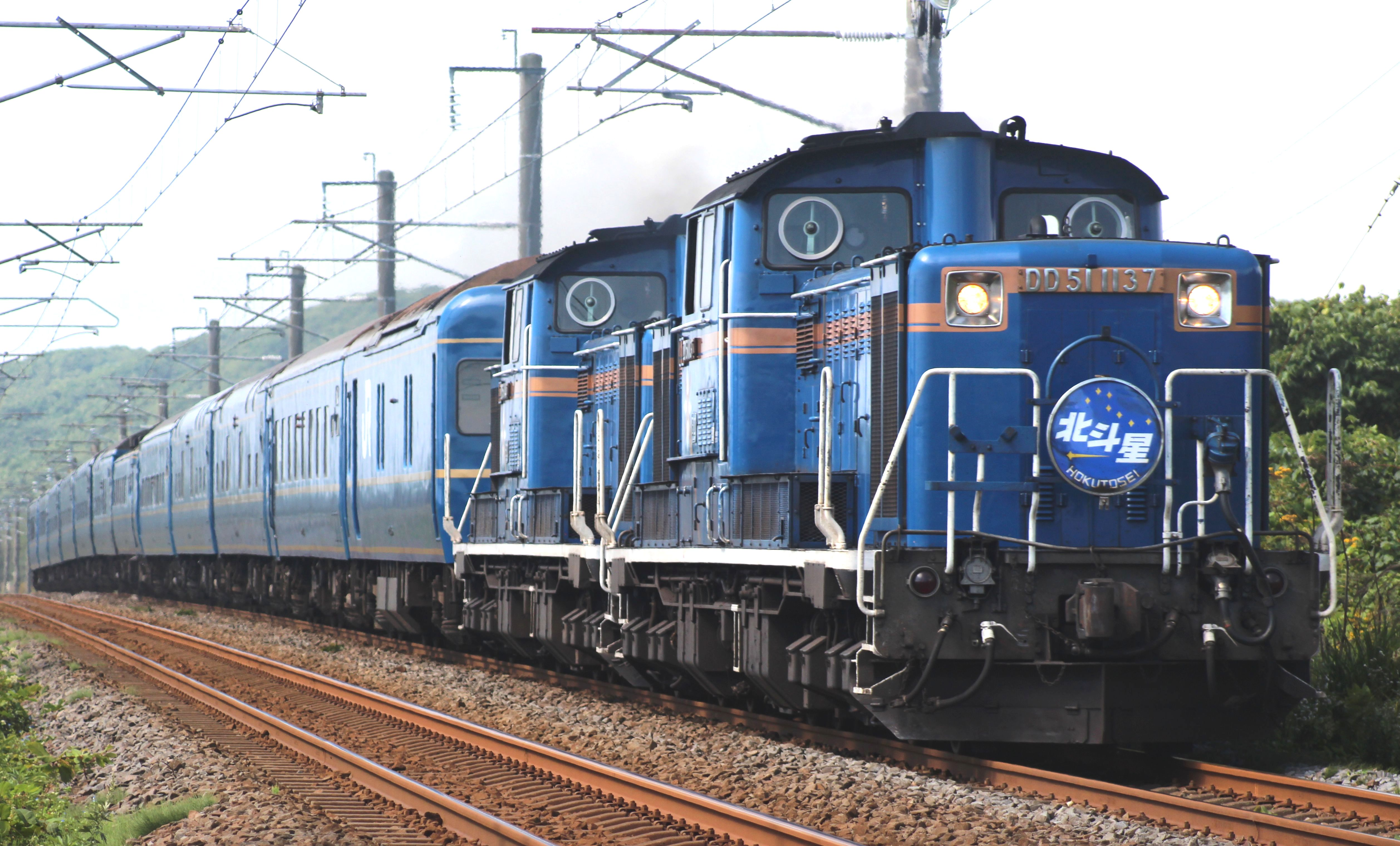 DD51形牽引寝台特急 北斗星